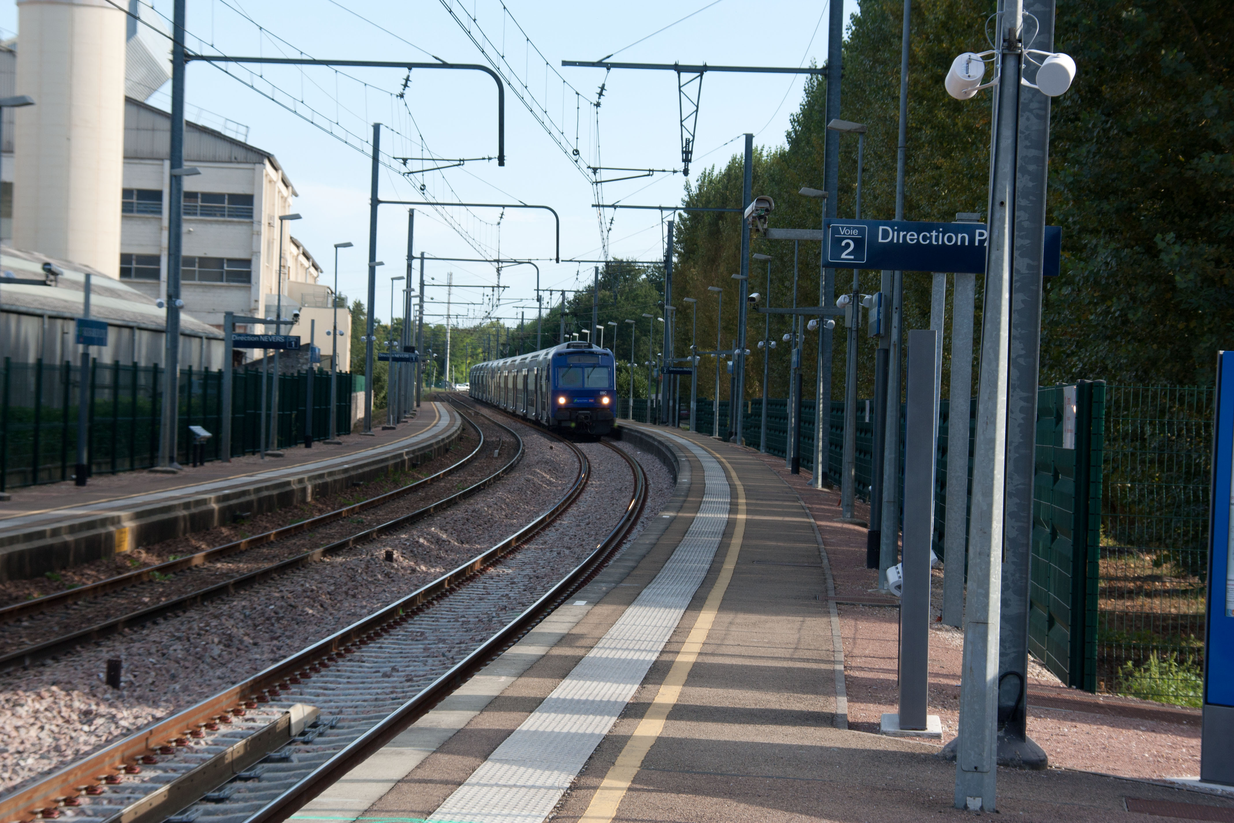 Gare de Bagneaux-sur-Loing, Bagneaux-sur-Loing, Seine-et-Marne, France.